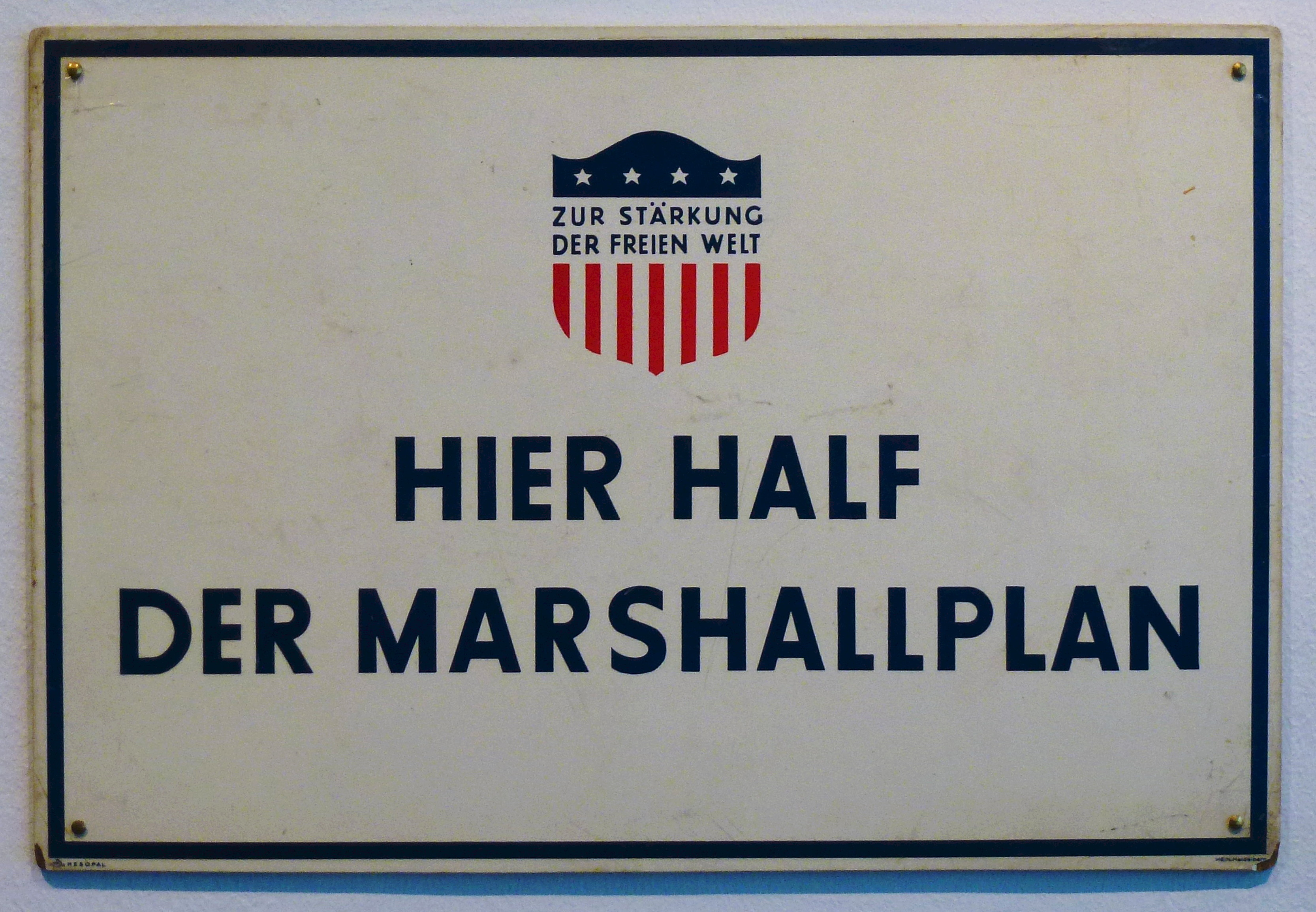 Schild "Hier half der Marschallplan"